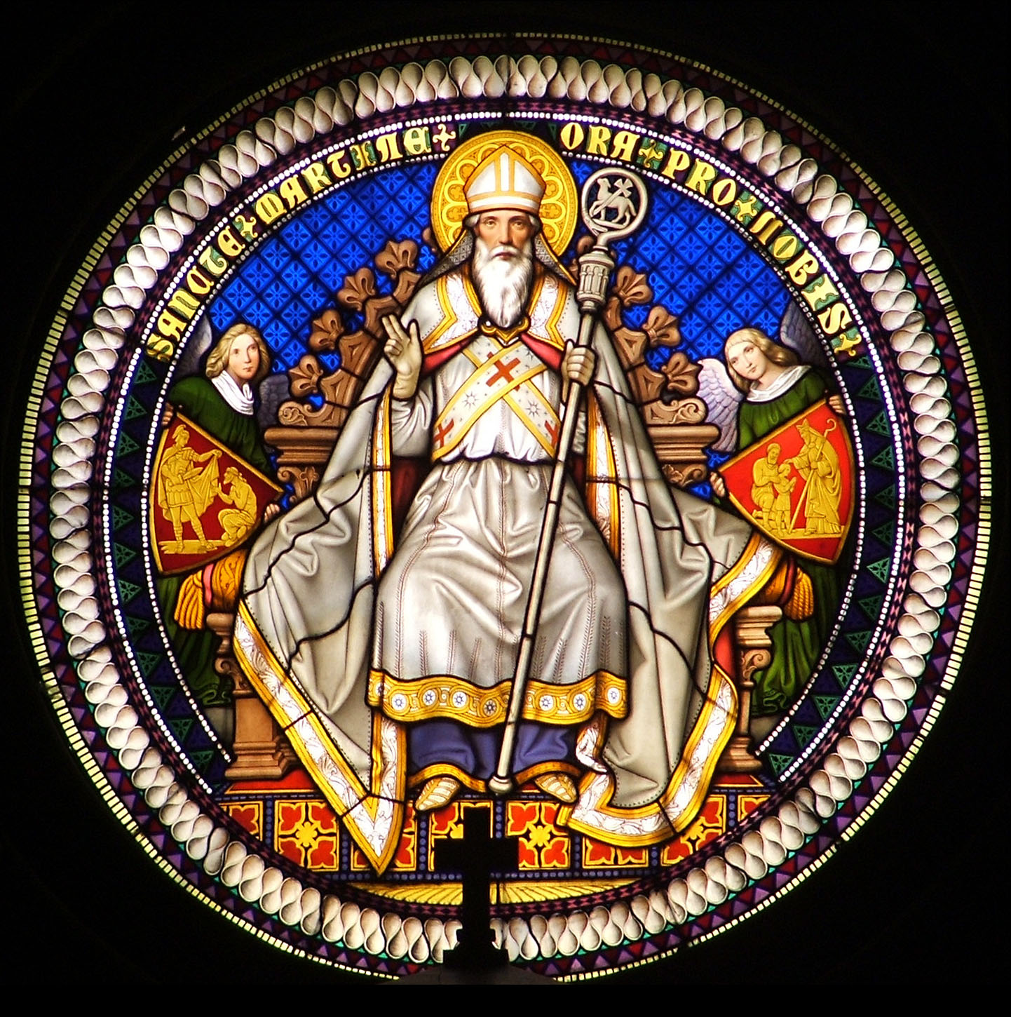 A Pannonhalmi Bencés Főapátság Szent Mártont ábrázoló ablaka